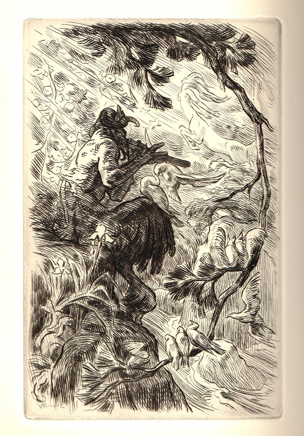 Gravure sur bois et sur cuivre de Victor Prouvé, illustration pour le roman d'André Lichtenberger "Les Centaures" dans la réédition parue chez Georges Crès en 1924. Le satyre Pirip, jouant de la flûte, est décovuert par la centauresse Kadilda pendant ses promenades dans la forêt.